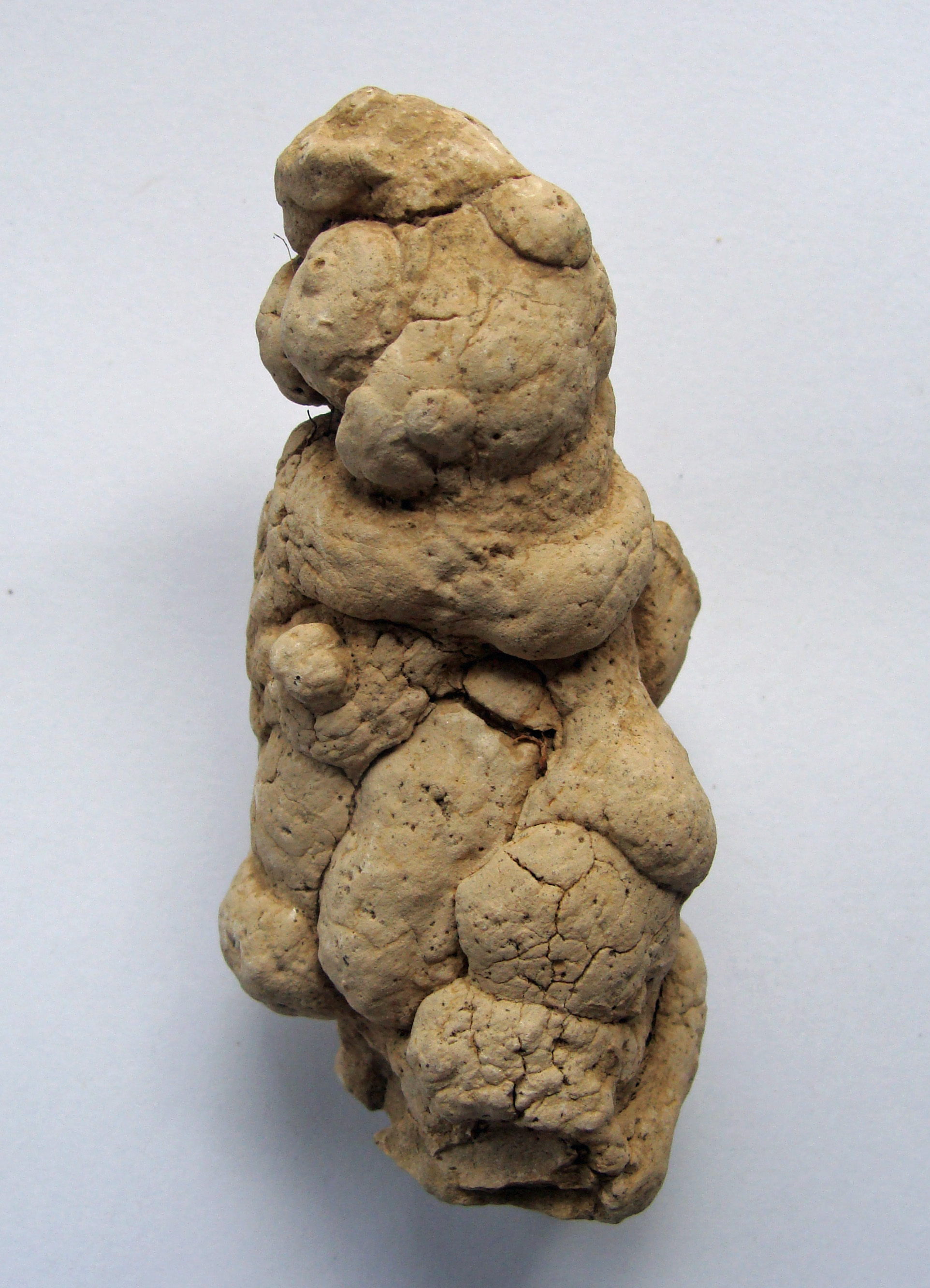 Concrétion trouvée dans le loess appelée poupée de loess. Localisation : Geispolsheim (Bas-Rhin).